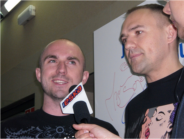 Kalwi & Remi. Zdjęcie zrobione podczas Eska Music Awards 2011 w katowickim Spodku.